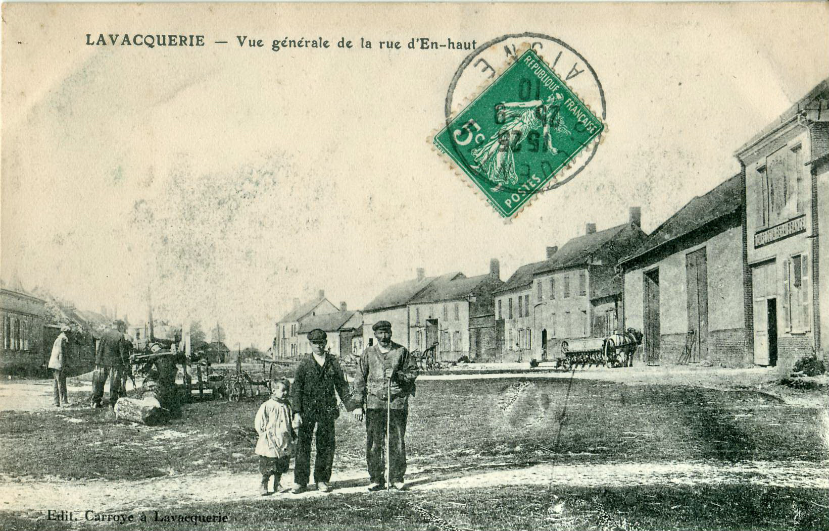 Carte postale ancienne édiyér par Carroye LAVACQUERIE : Vue générale de la rue d'En Haut